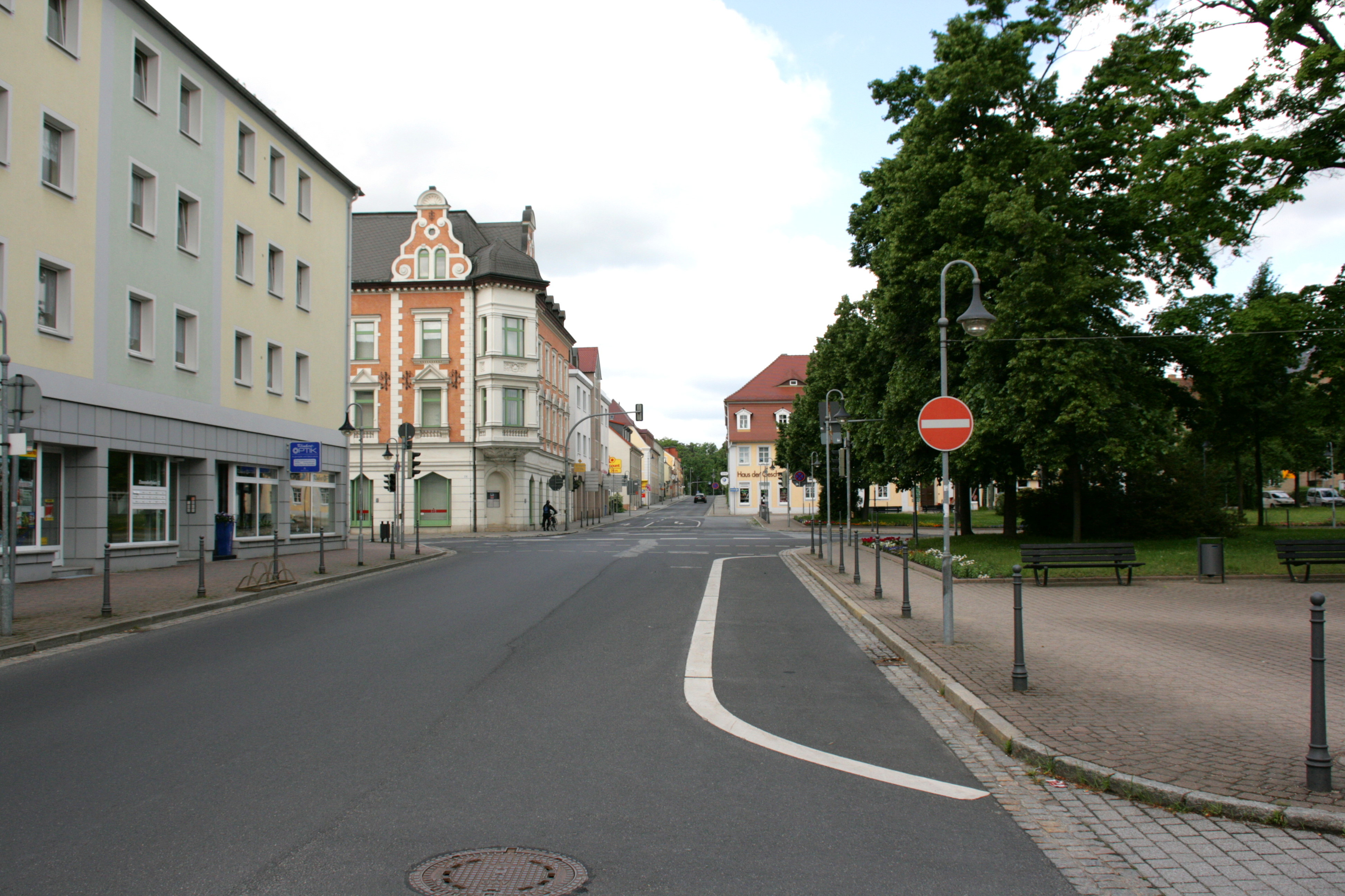 Ecke Bautzener Straße / Görlitzer Straße / Zinzendorfplatz in Niesky